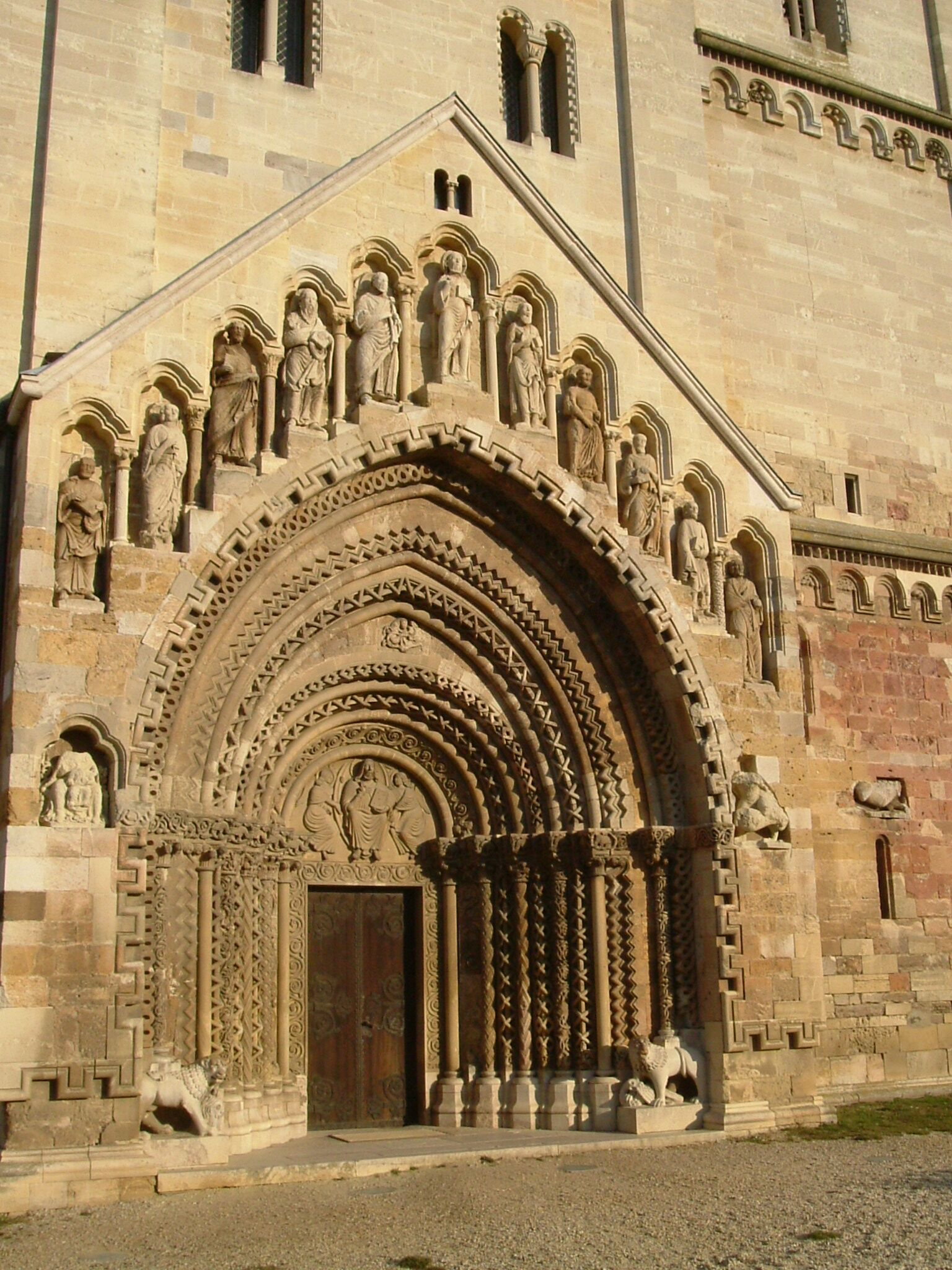 Jáki templom, főkapu